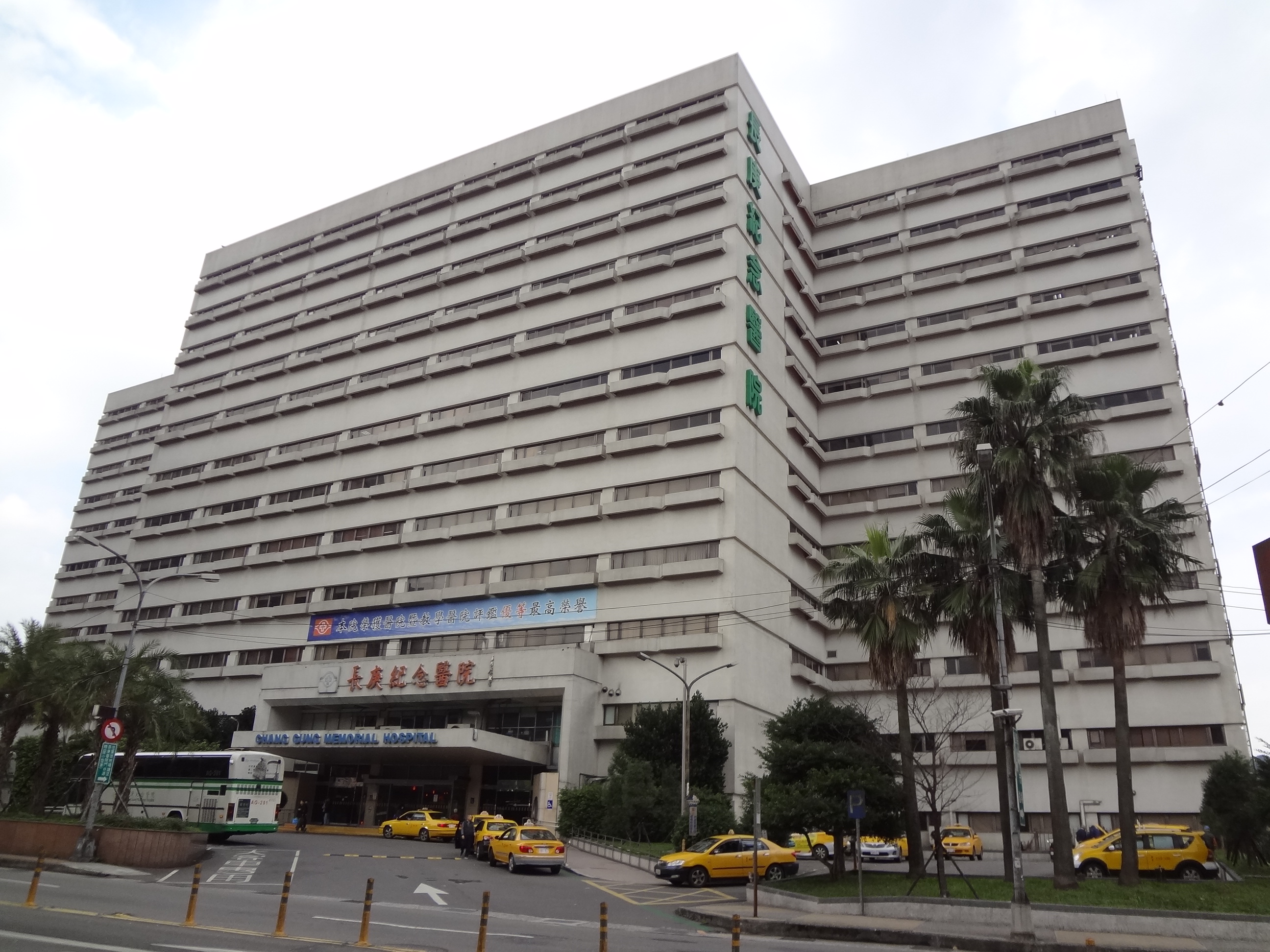 基隆長庚紀念醫院，位於臺灣基隆市安樂區麥金路222號。